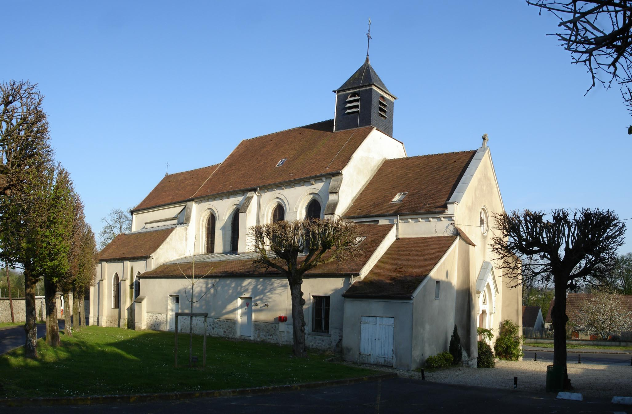 Église de Pomponne (Seine-et-Marne), France Avril 2007 Photo personnelle (own work) de Clicsouris